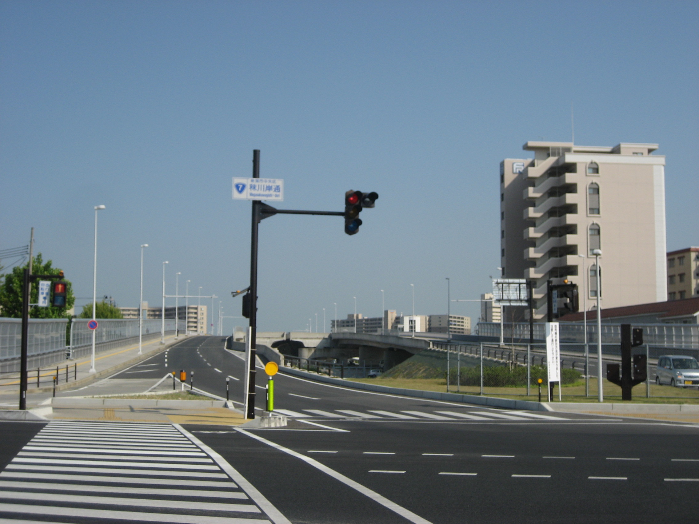 Chuo Ward, Niigata, Niigata Prefecture, Japan